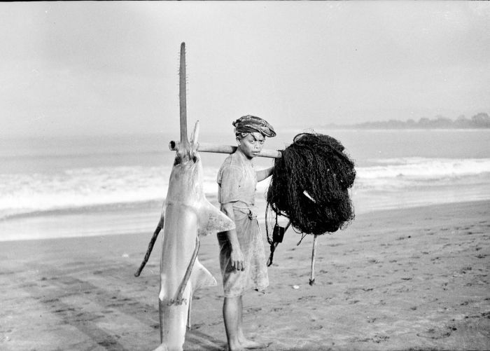 Negatief. Man op het strand met een gevangen zaagvis, Nederlands-Indië